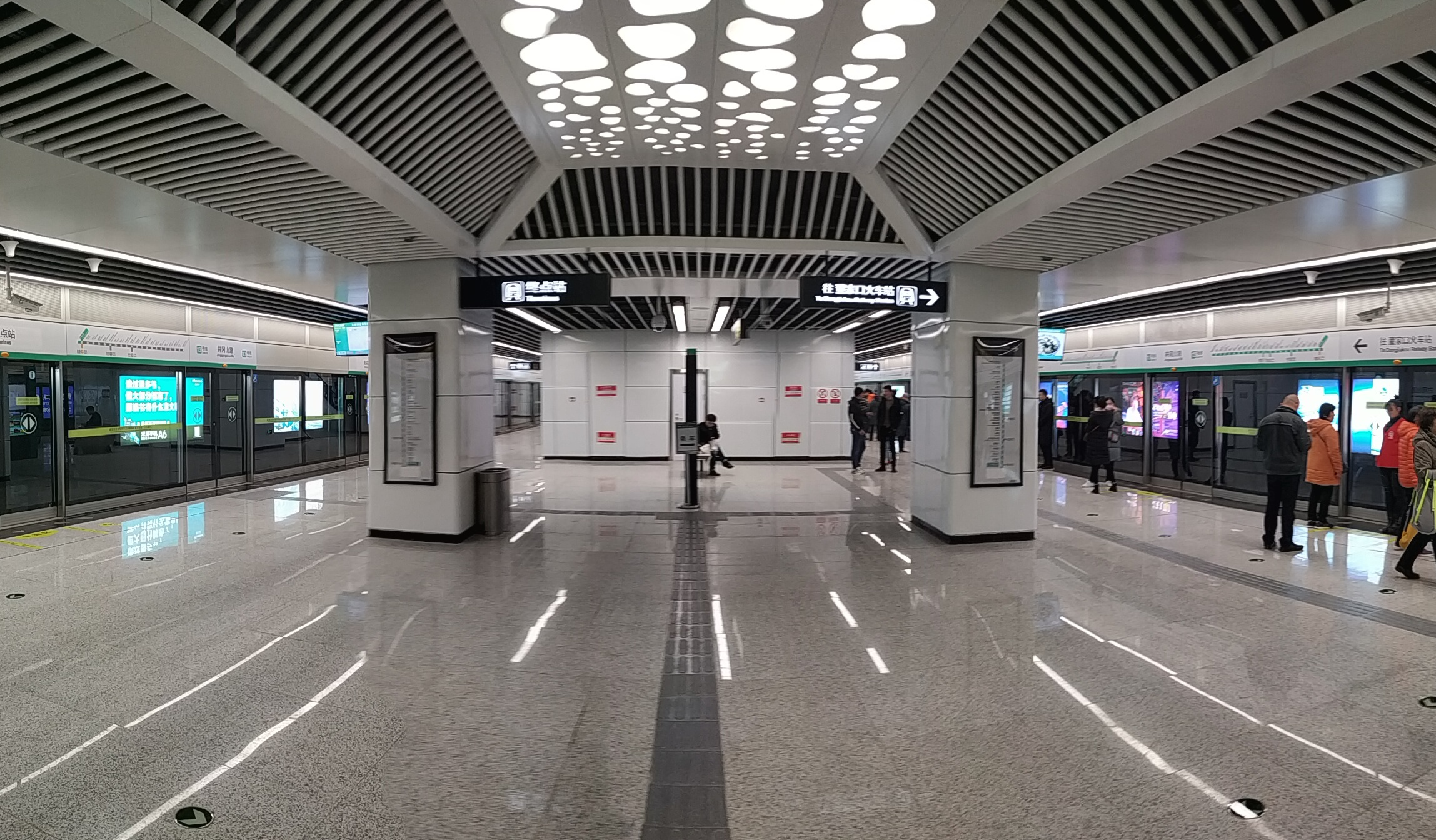 井冈山路站站台